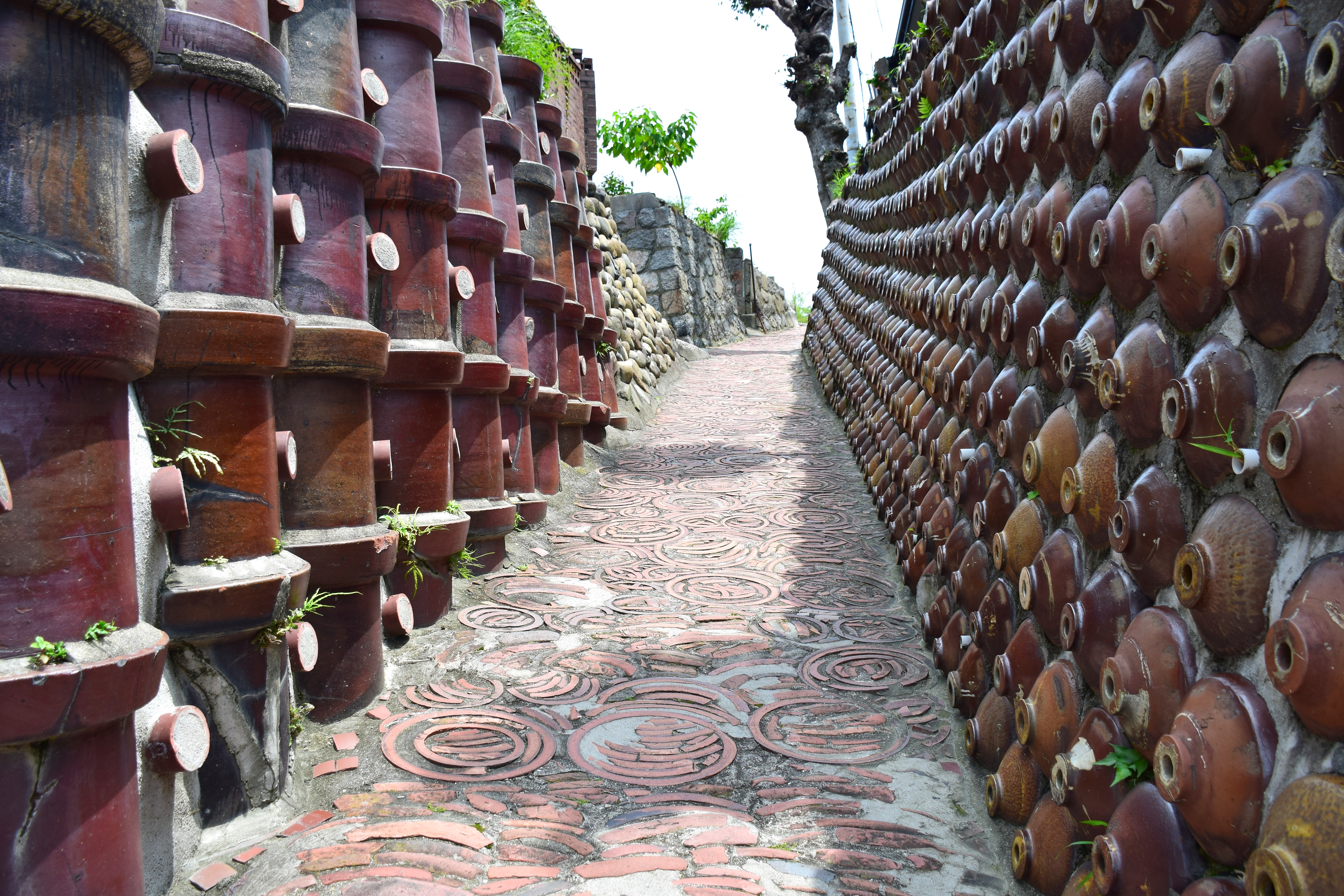 やきもの散歩道（土管坂）